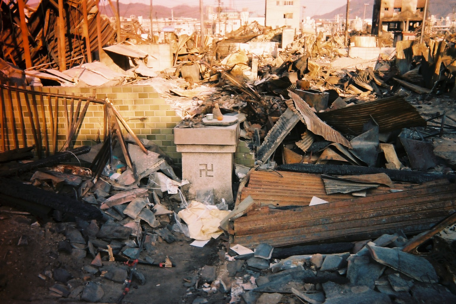 阪神神戸大震災 1995